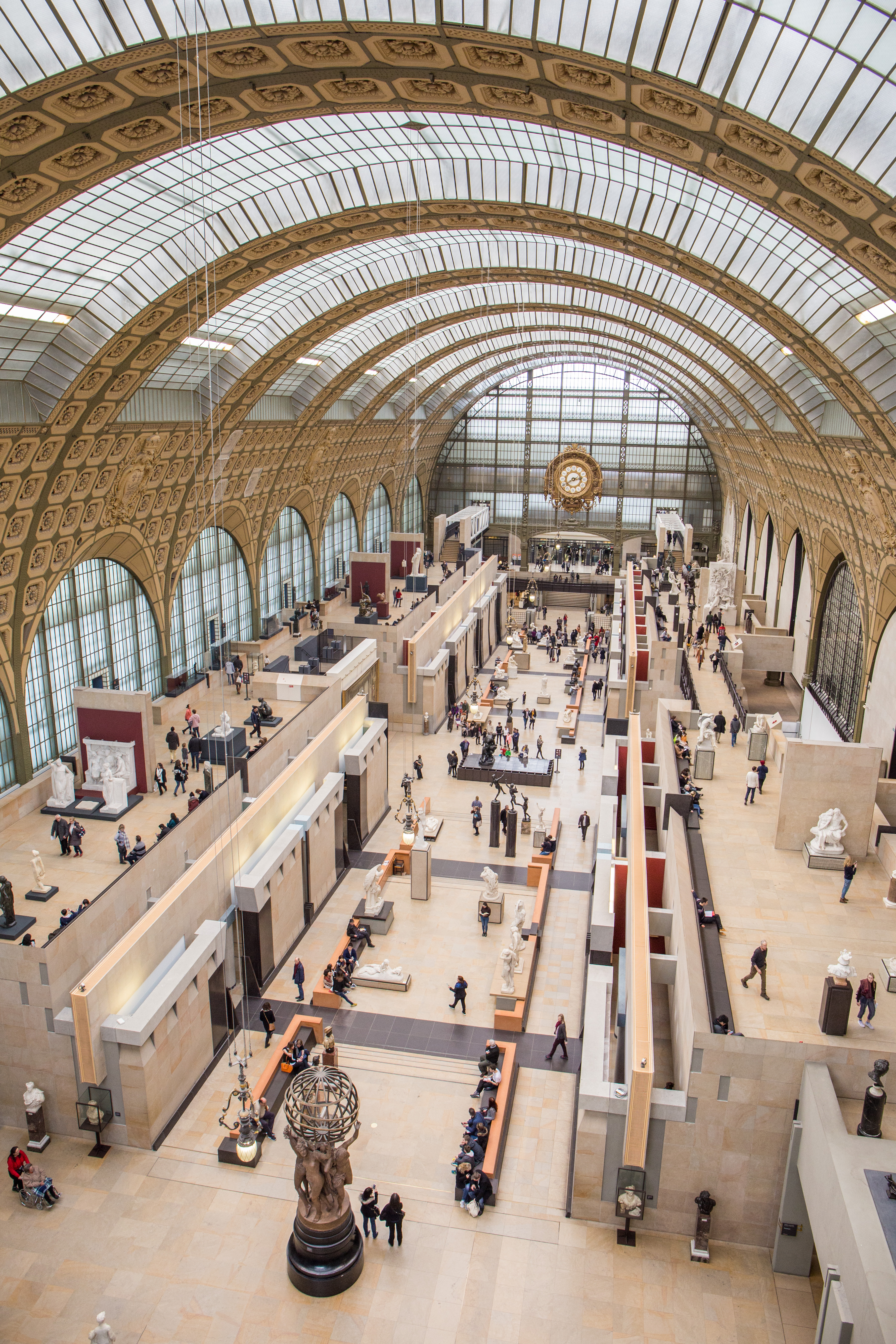 Hall principal du Musée d'Orsay